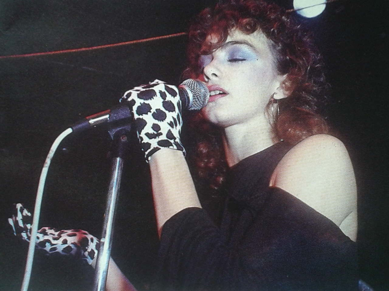 Virginie Boutaud vocalista da banda Metrô durante um show em 1985.